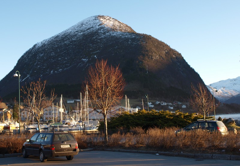 Rotsethornet, Volda, Møre og Romsdal,Noreg